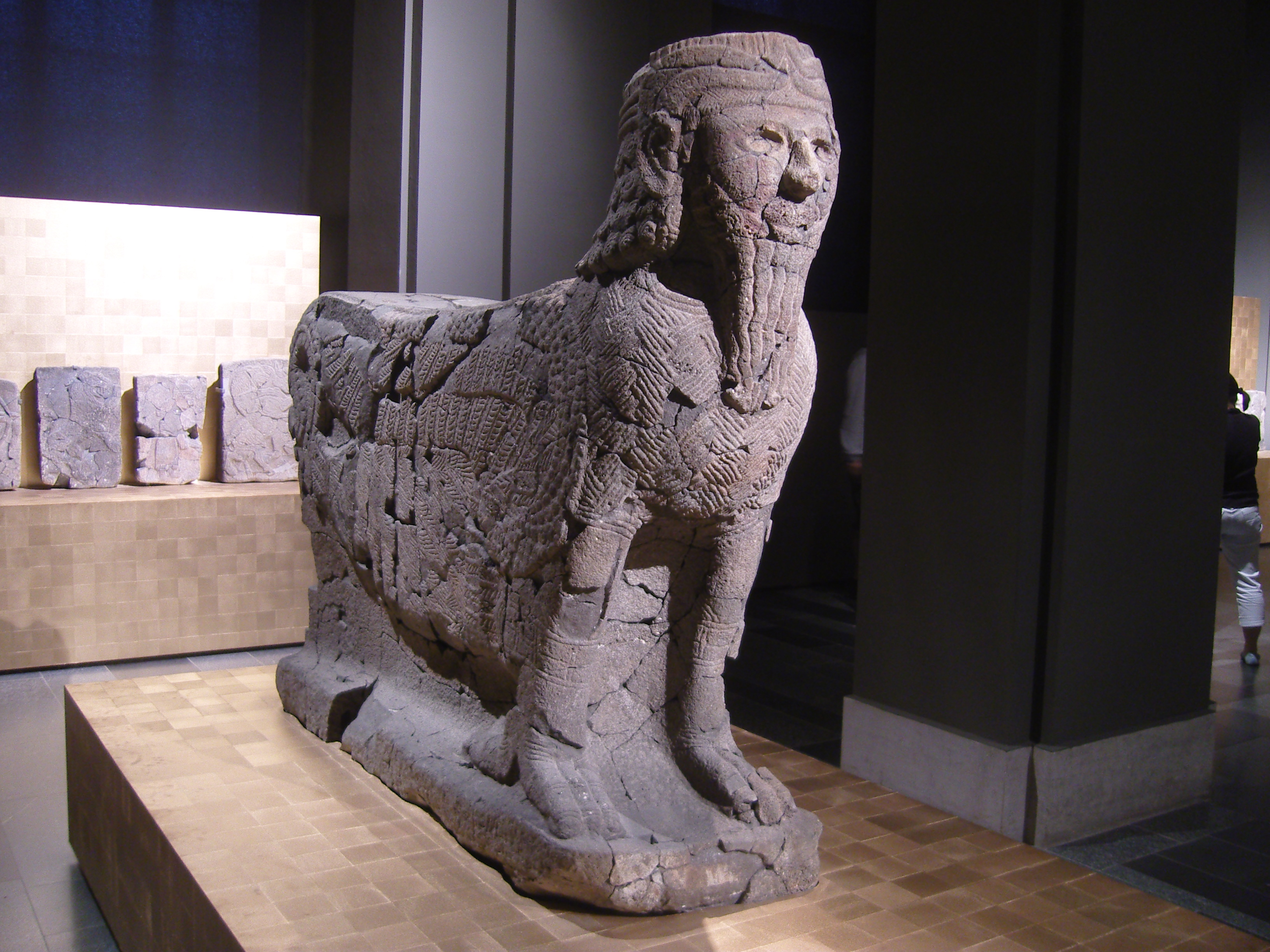 Ausstellung "Die Geretteten Götter aus dem Palast vom Tell Halaf" Sphinx